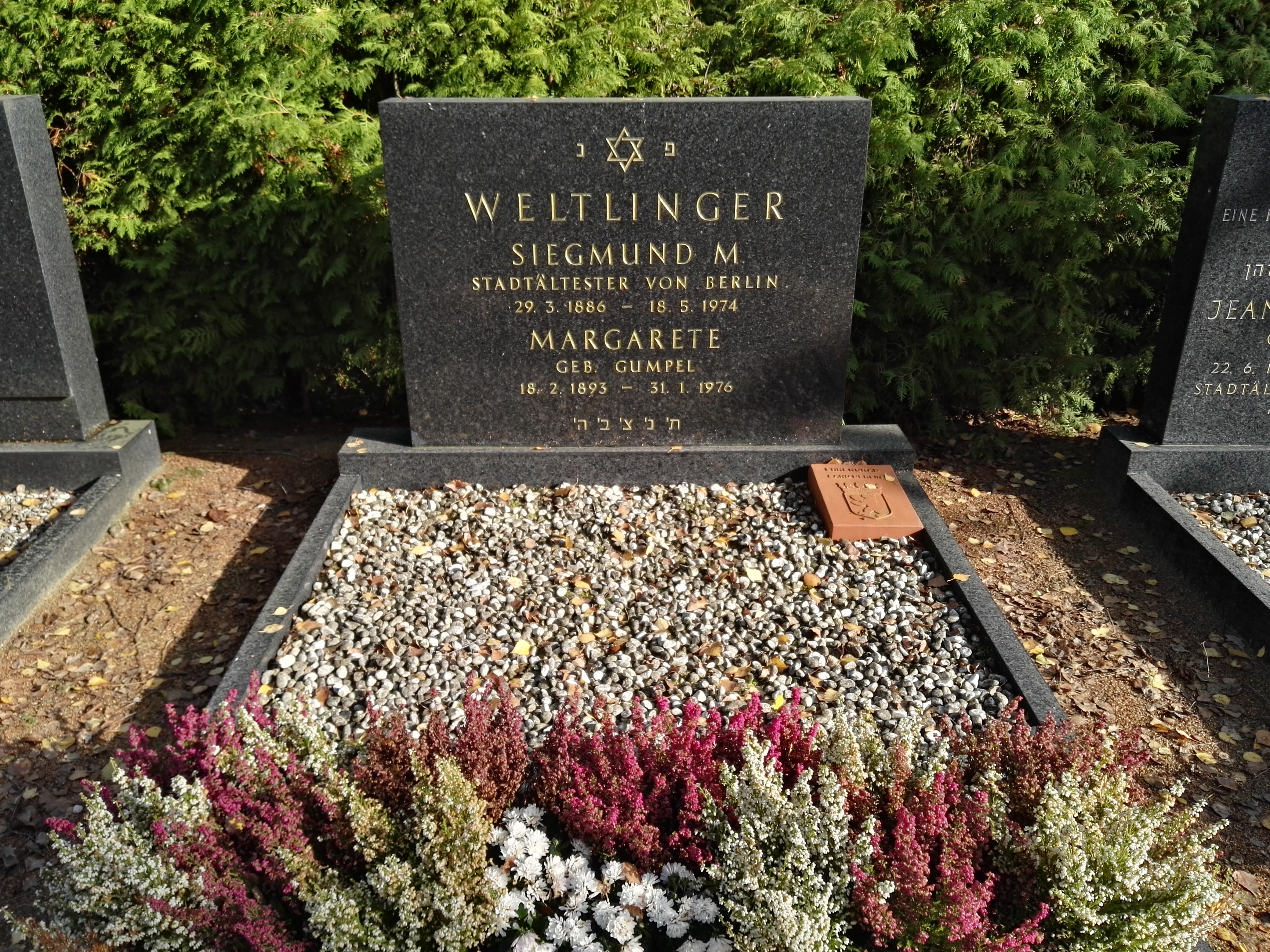 Grab von Siegmund Weltlinger auf dem Jüdischer Friedhof Heerstraße. Ehrengrab